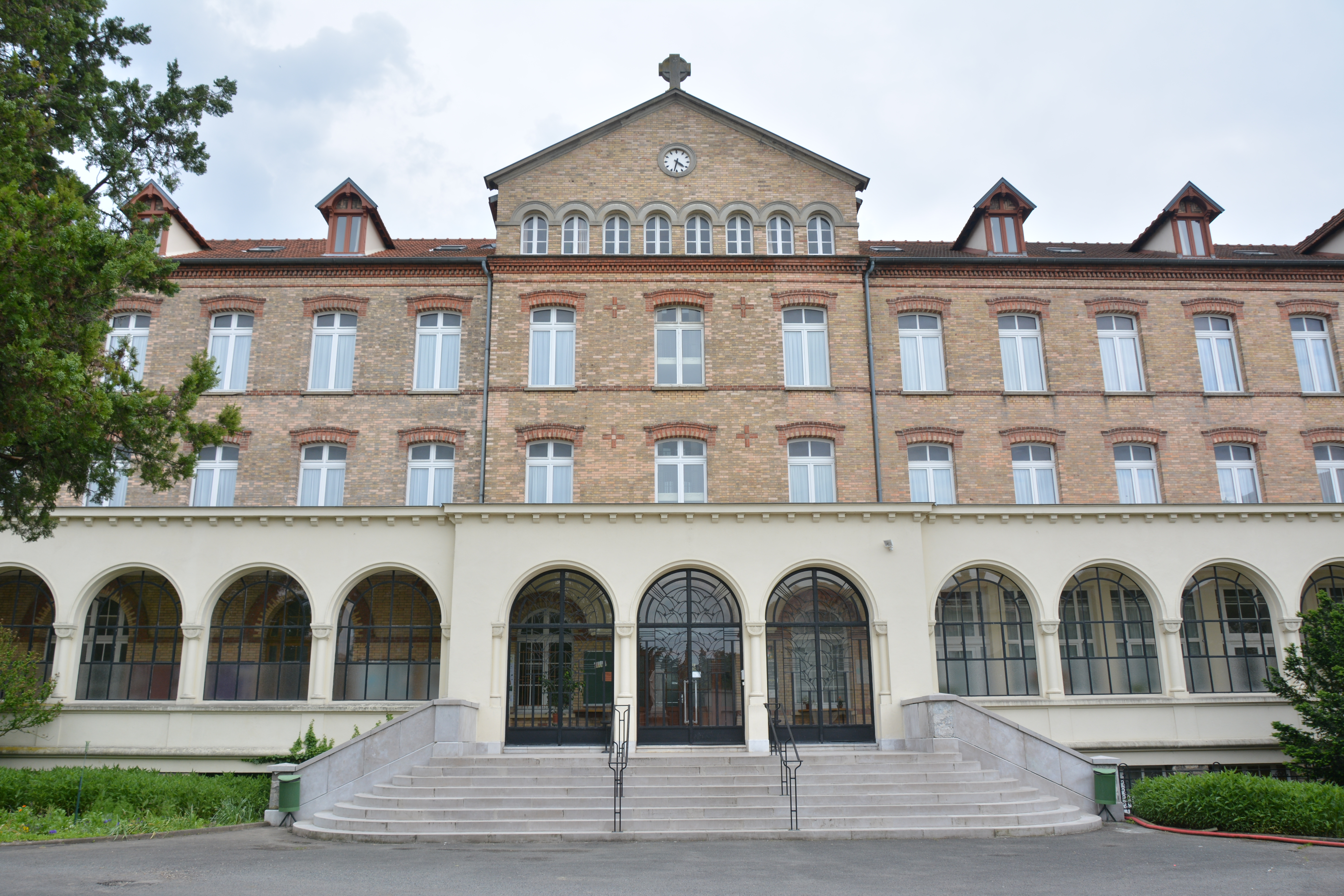 Bâtiment de l'accueil du séminaire des missions dans la communauté spiritaine de Chevilly-Larue